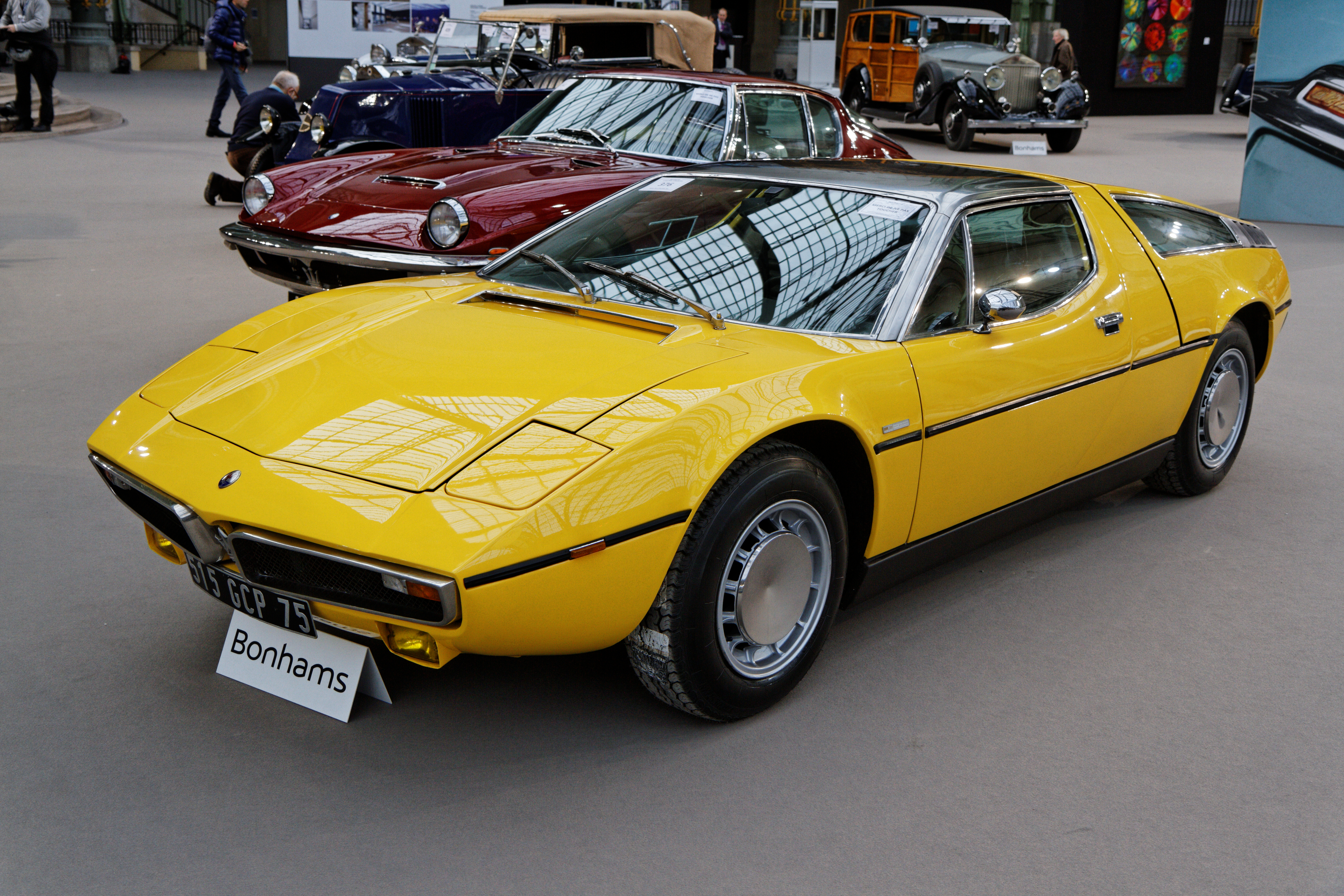 Une Maserati Bora 4.7 litre Coupé au Grand Palais lors de la vente Bonhams en février 2014.